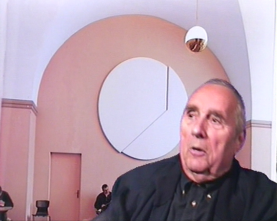 Portrait de Gottfried Honegger